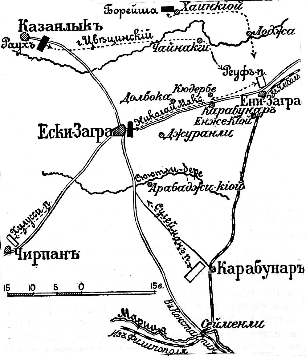 Это изображение было использовано для иллюстрирования статьи «Ени-Загра (Иени-Загра, Ени-Зара, Нова-Загора)» опубликованной в десятом томе «Военной энциклопедии», который был издан книгоиздательским товариществом И. Д. Сытина в 1912—1913 гг. в столице Российской империи городе Санкт-Петербурге.